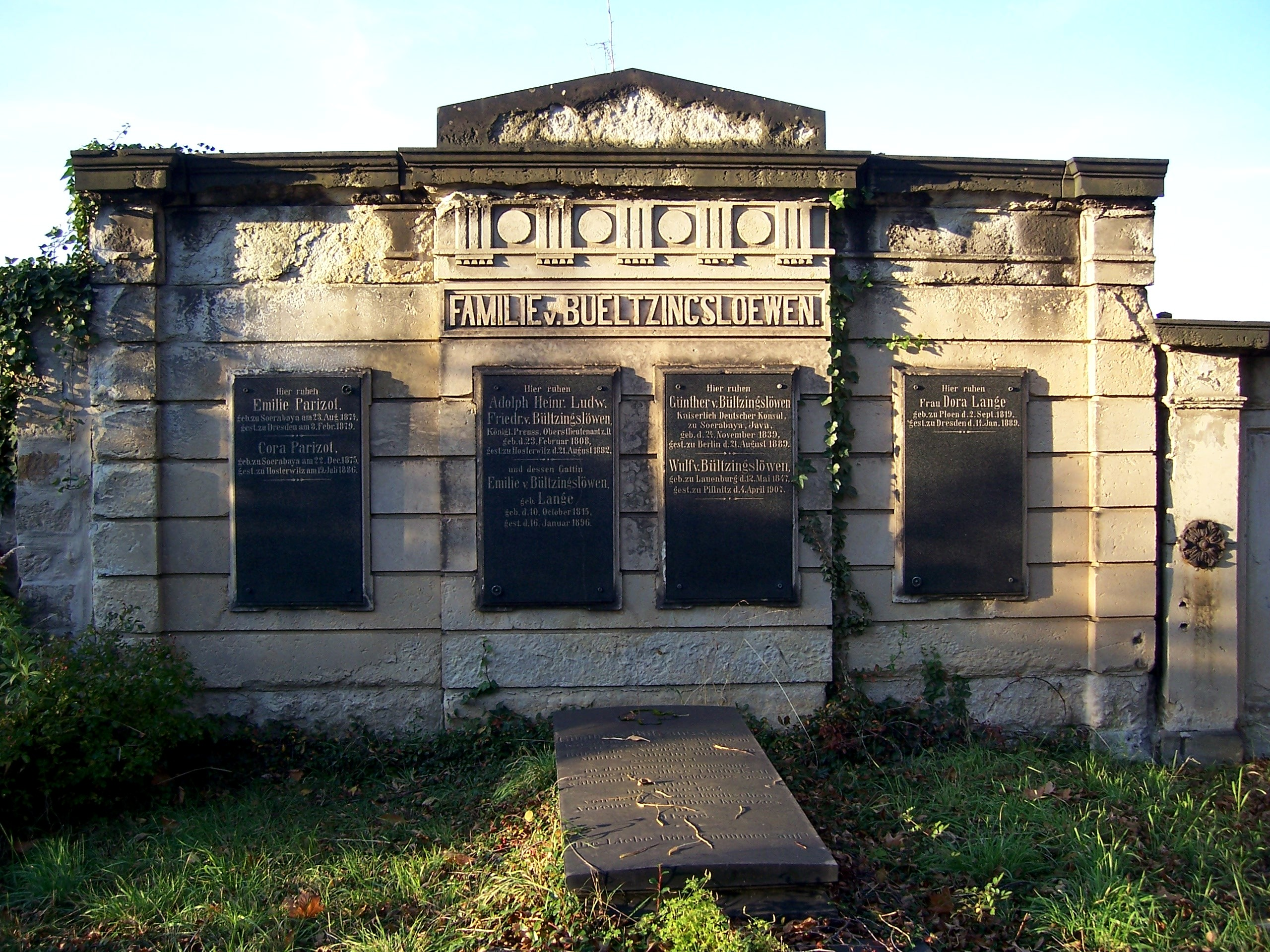 Familiengrabstätte Bültzingslöwen auf dem Alten Annenfriedhof, unter anderem Grabstätte von Günther von Bültzingslöwen